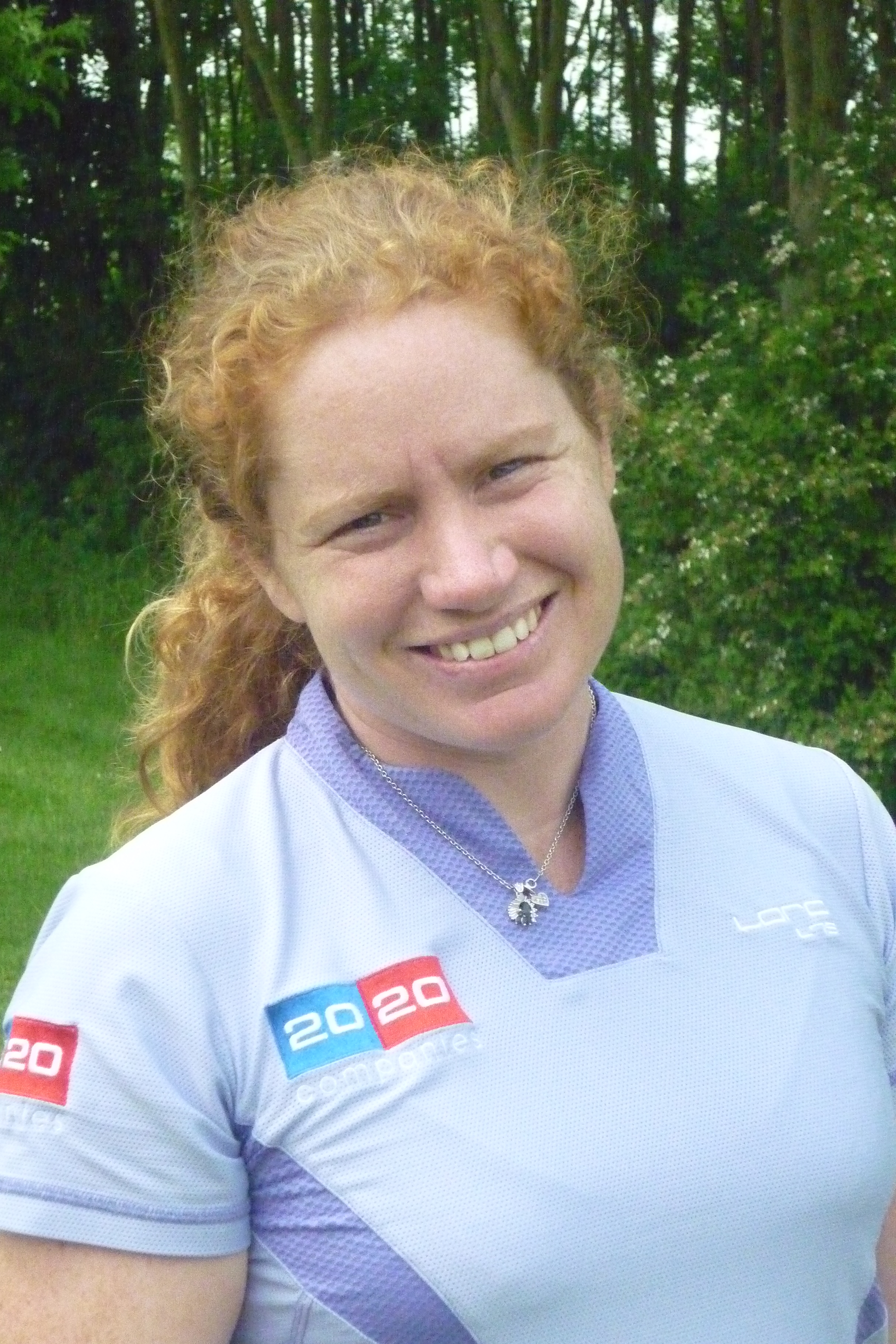 Mikaela PArmlid op Broekpolder